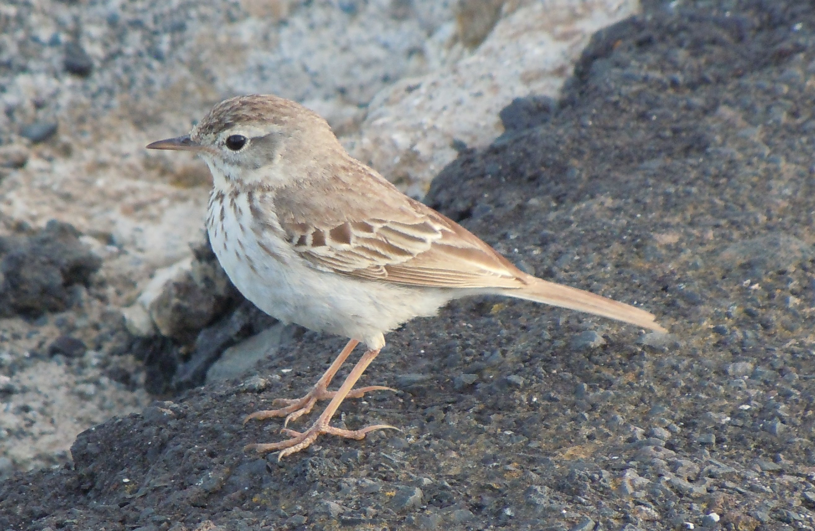 Pipit de Berthelot (Anthus berthelotii) à Lanzarote